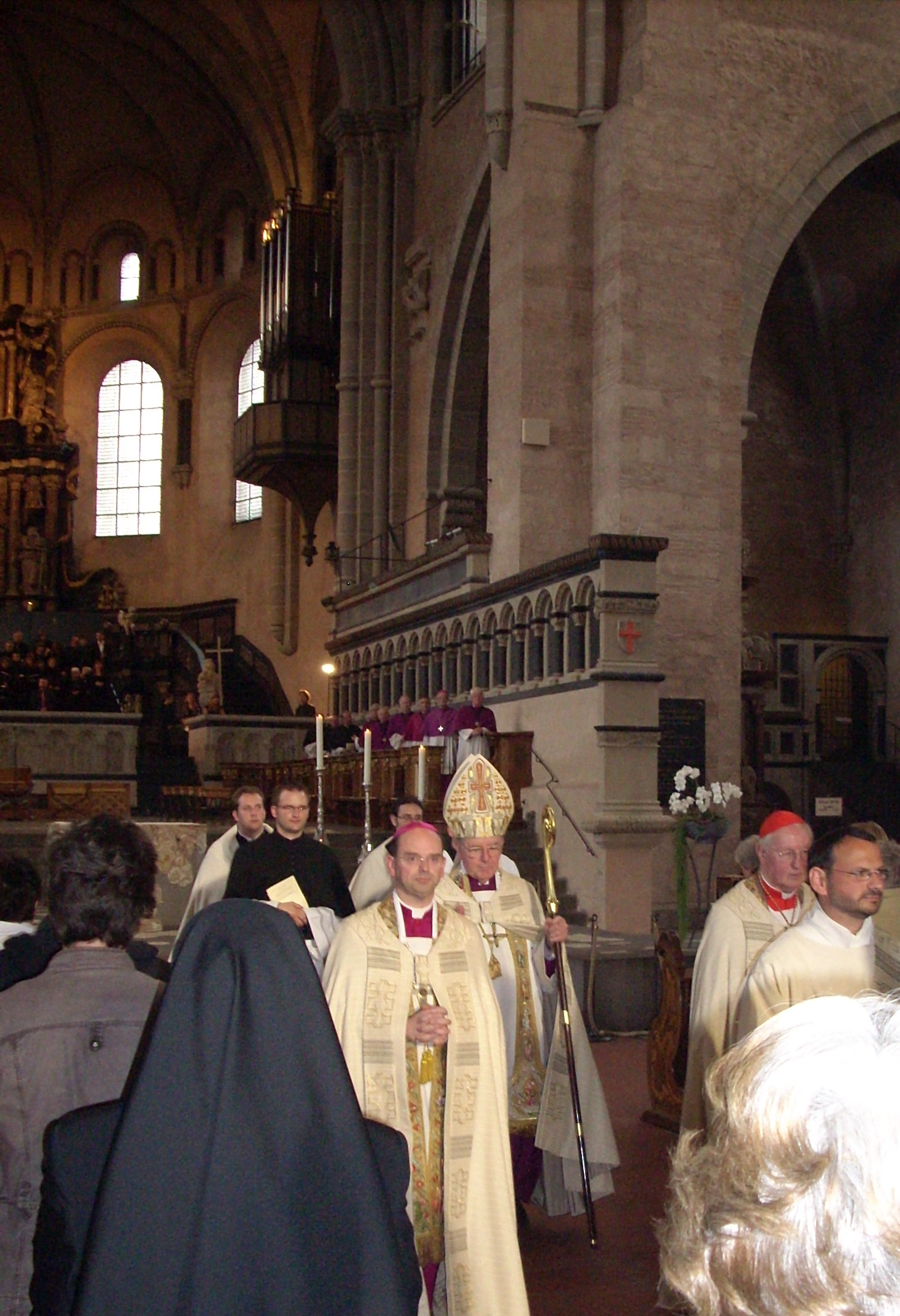 Auszug nach der Vesper im Hohen Dom zu Trier zum 40-jährigen Jubiläum der Bischofsweihe des emeritierten Trierer Weihbischofs Dr. Alfred Kleinermeilert (Bildmitte). Links: Diözesanadministrator Weihbischof Robert Brahm. Rechts: Alterzbischof von München und Freising Dr. Friedrich Kardinal Wetter. Hinten im Chorgestühl: Weihbischof em. Leo Schwarz (zweiter von rechts)